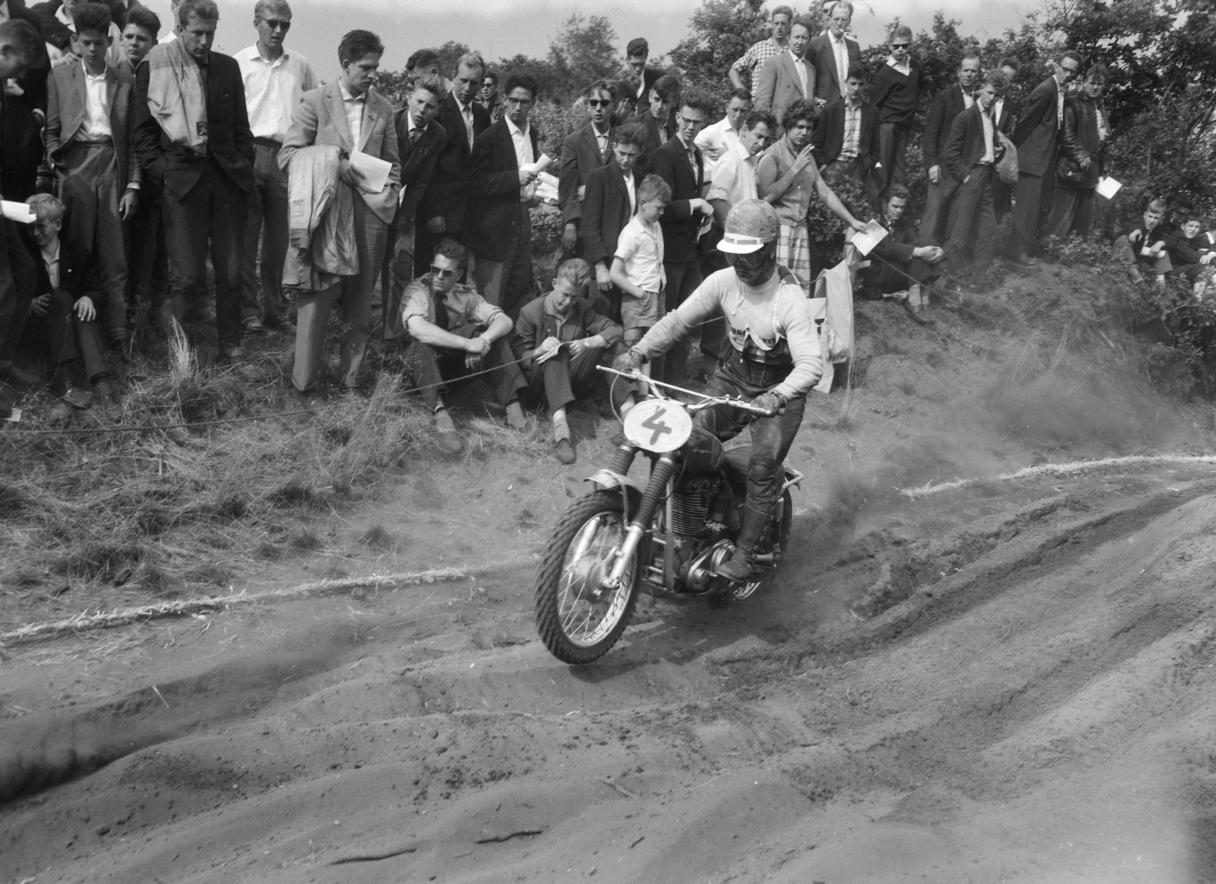 Collectie / Archief : Fotocollectie Anefo Reportage / Serie : [ onbekend ] Beschrijving : Grand Prix Motor Cross in Bergharen Datum : 24 juli 1960 Locatie : Bergharen Fotograaf : Behrens, Herbert / Anefo Auteursrechthebbende : Nationaal Archief Materiaalsoort : Negatief (zwart/wit) Nummer archiefinventaris : bekijk toegang 2.24.01.04 Bestanddeelnummer : 911-4496